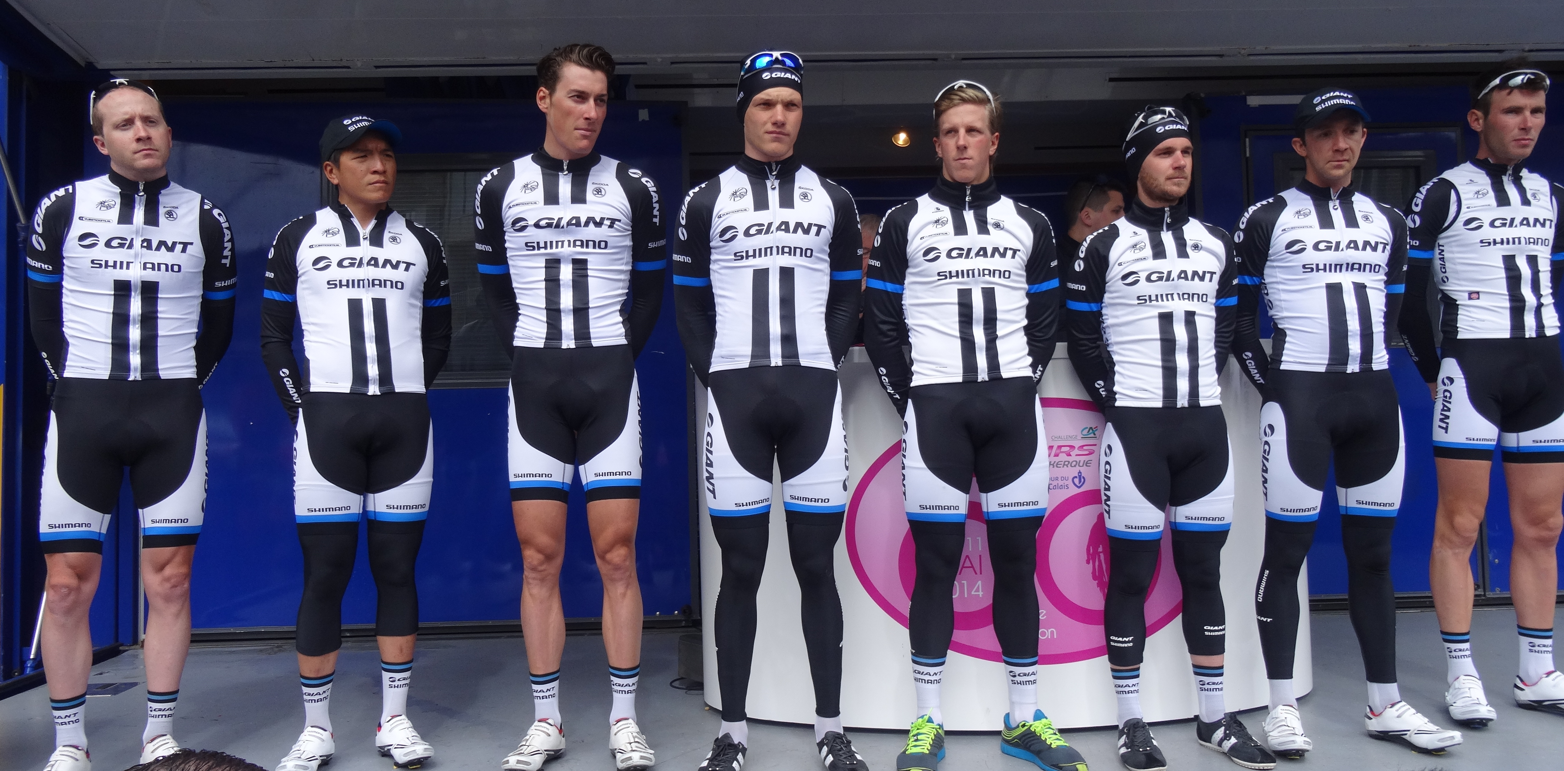 Reportage photographique réalisé le mercredi 7 mai 2014 au départ de la première étape de l'édition 2014 des Quatre jours de Dunkerque à Dunkerque, Nord, Nord-Pas-de-Calais, France. Depicted people: Thomas Peterson, Loh Sea Keong, Ramon Sinkeldam, Nikias Arndt, Jonas Ahlstrand, Johannes Fröhlinger, Thierry Hupond and Brian Bulgaç Depicted team: Giant-Shimano